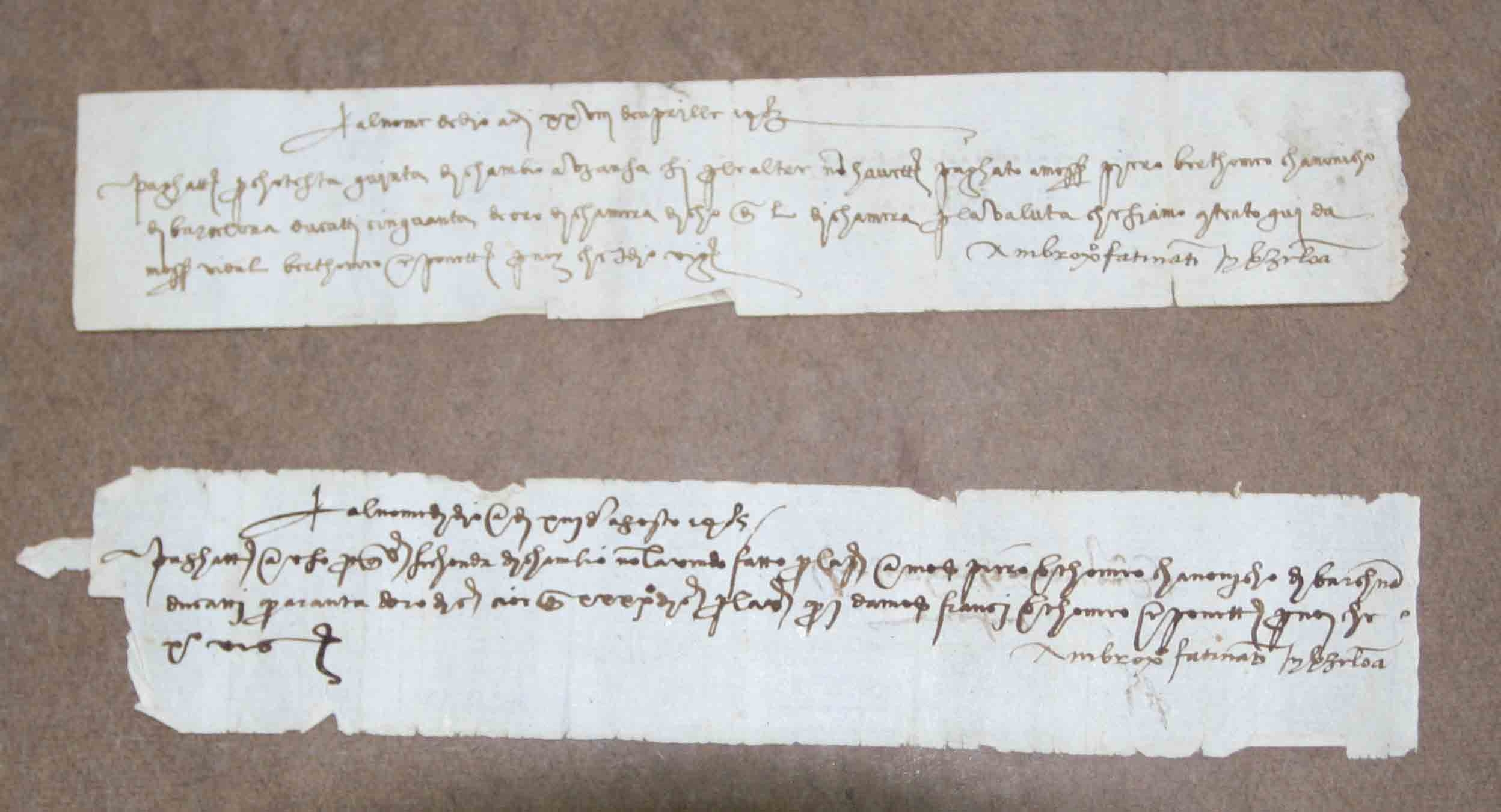 Lletres de canvi lliurades pel mercader italià Fattinelli a Pere Bartomeu, canonge de Barcelona, Francesc Bartomeu i Vidal Bartomeu, notari de Vilafranca. Dades tècniques Títol: Lletres de canvi Data: 1483-1484 Suport material: paper Mides: 40 x 170 mm